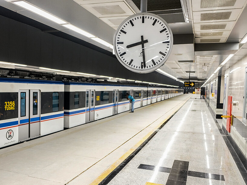 خط ۷ مترو تهران.